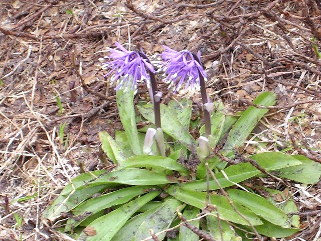 ショウジョウバカマ (北海道大雪山) Heloniopsis orientalis (Mt.Daisetsu, Hokkaido, JAPAN)